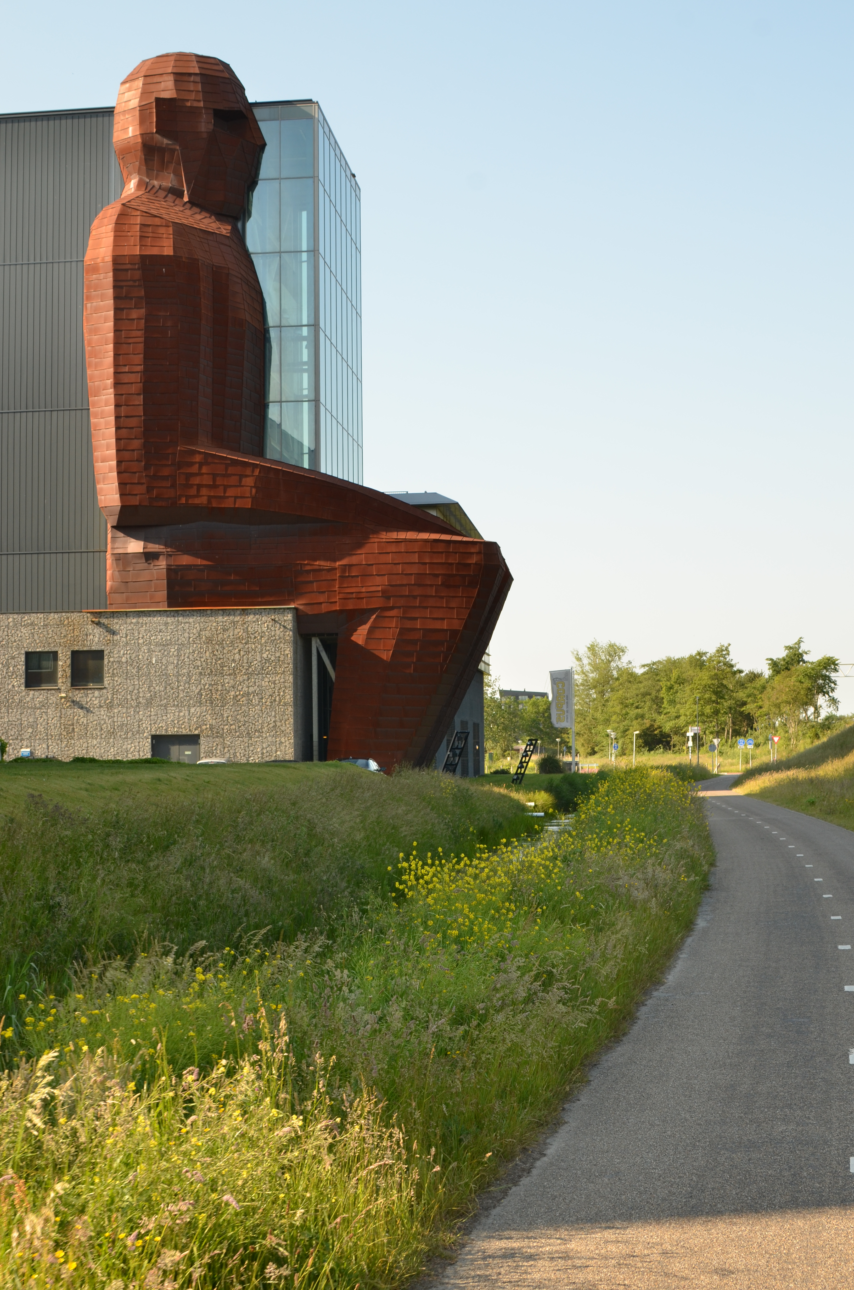 Museum Corpus in Oegstgeest.